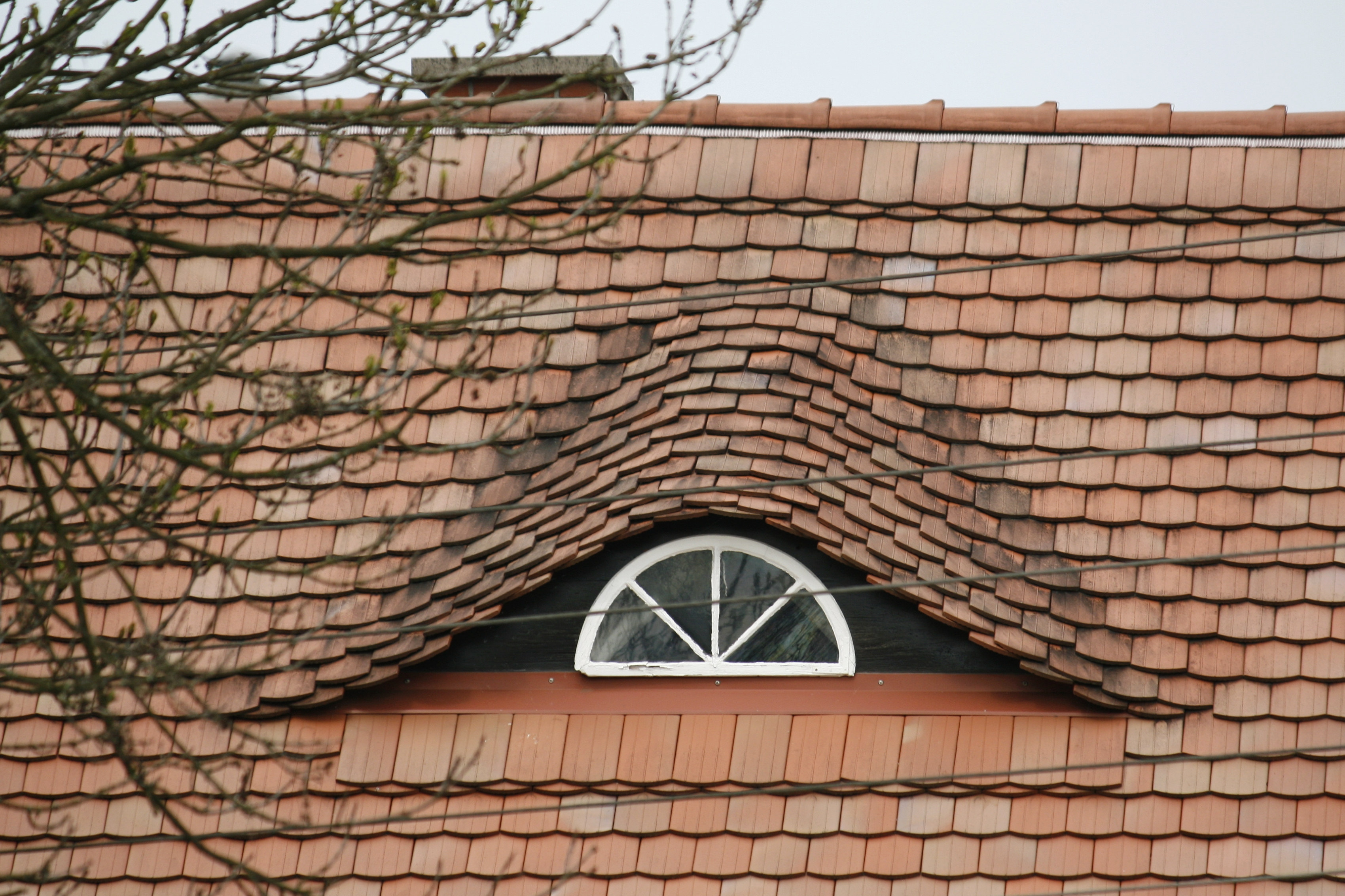 Großschönau, Sasko, Německo